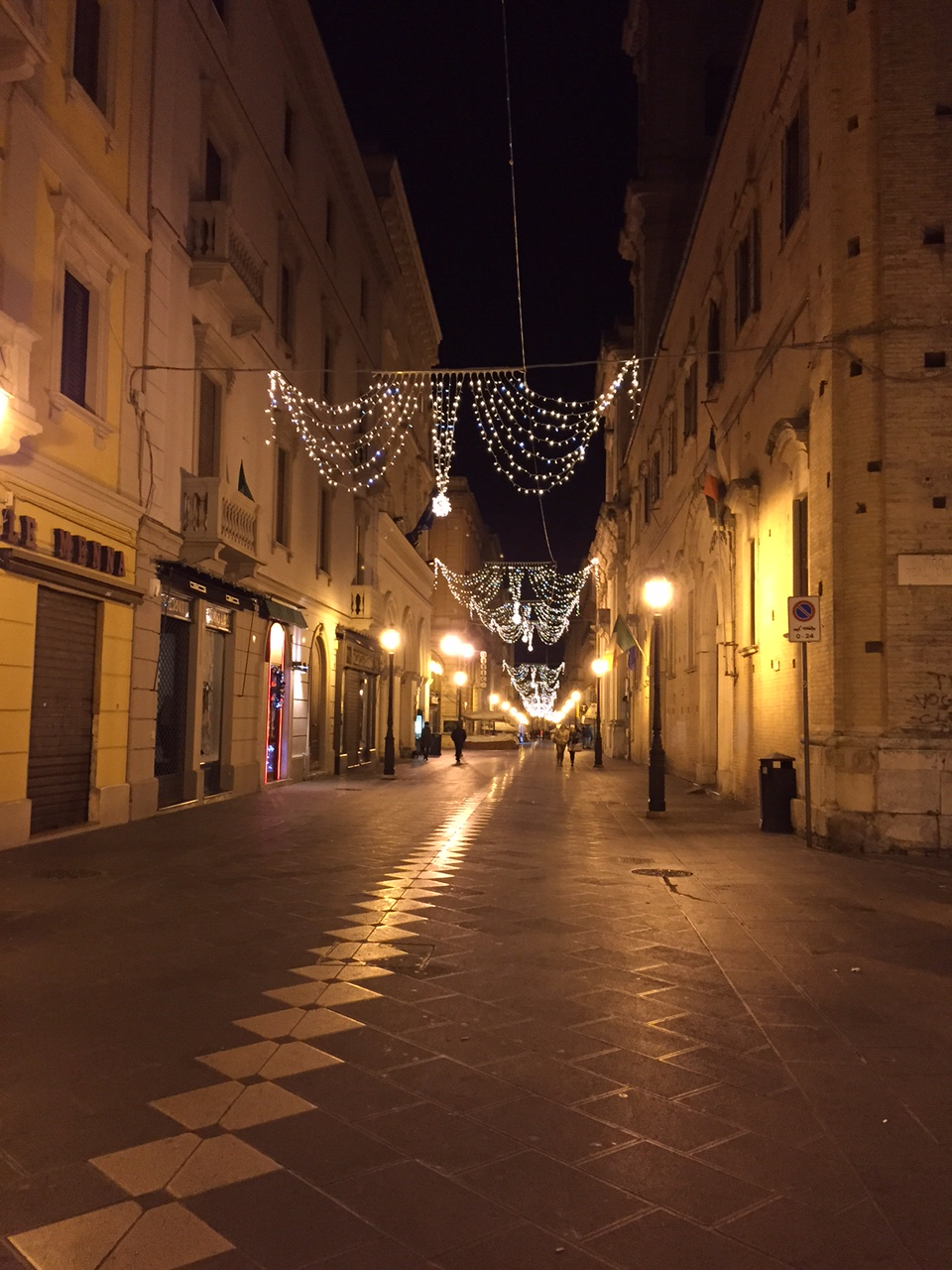 Foto notturna del Corso Marruccino con luci natalizie